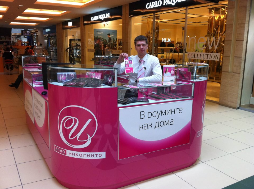 Офис экспресс-обслуживания сети связи "Алло Инкогнито"